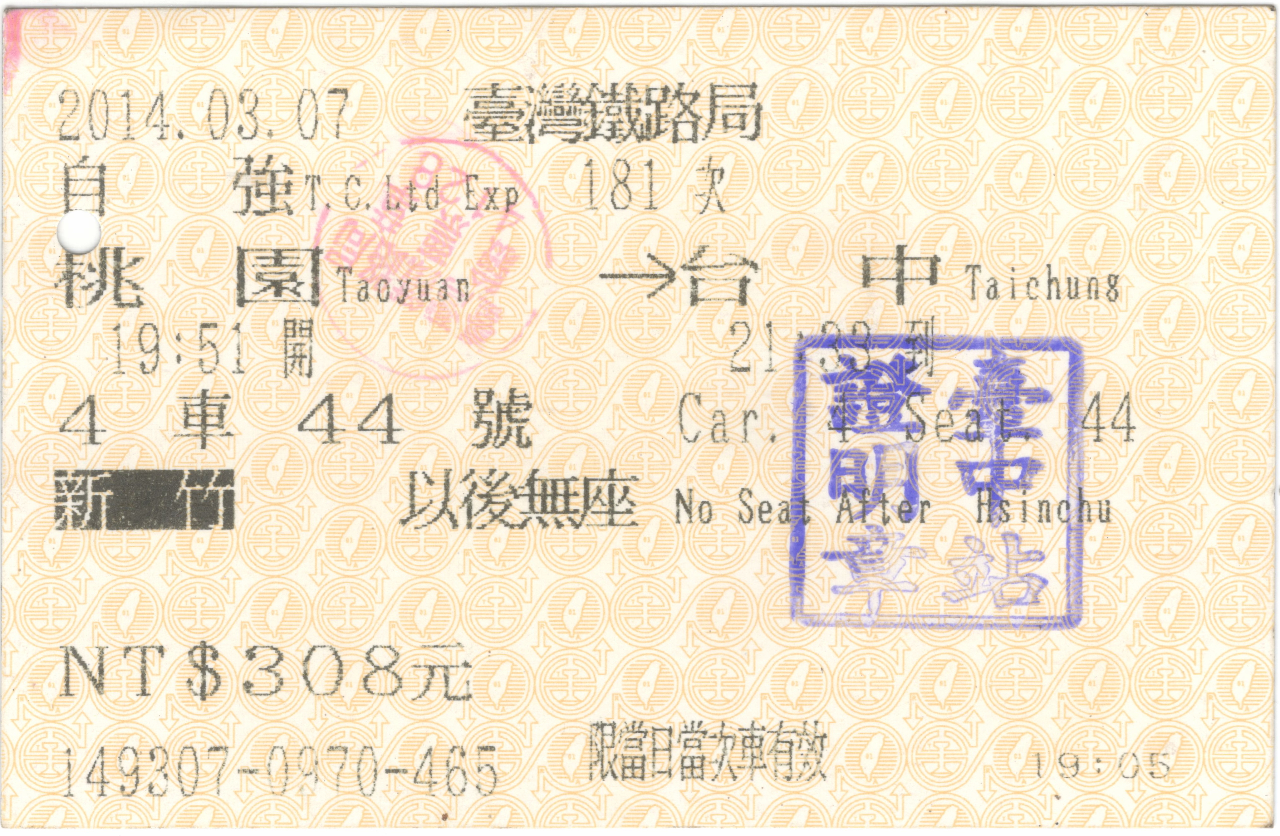 臺灣鐵路管理局第181車次自強號車票，從桃園站到臺中站，蓋印車長驗票章與臺中站證明章。